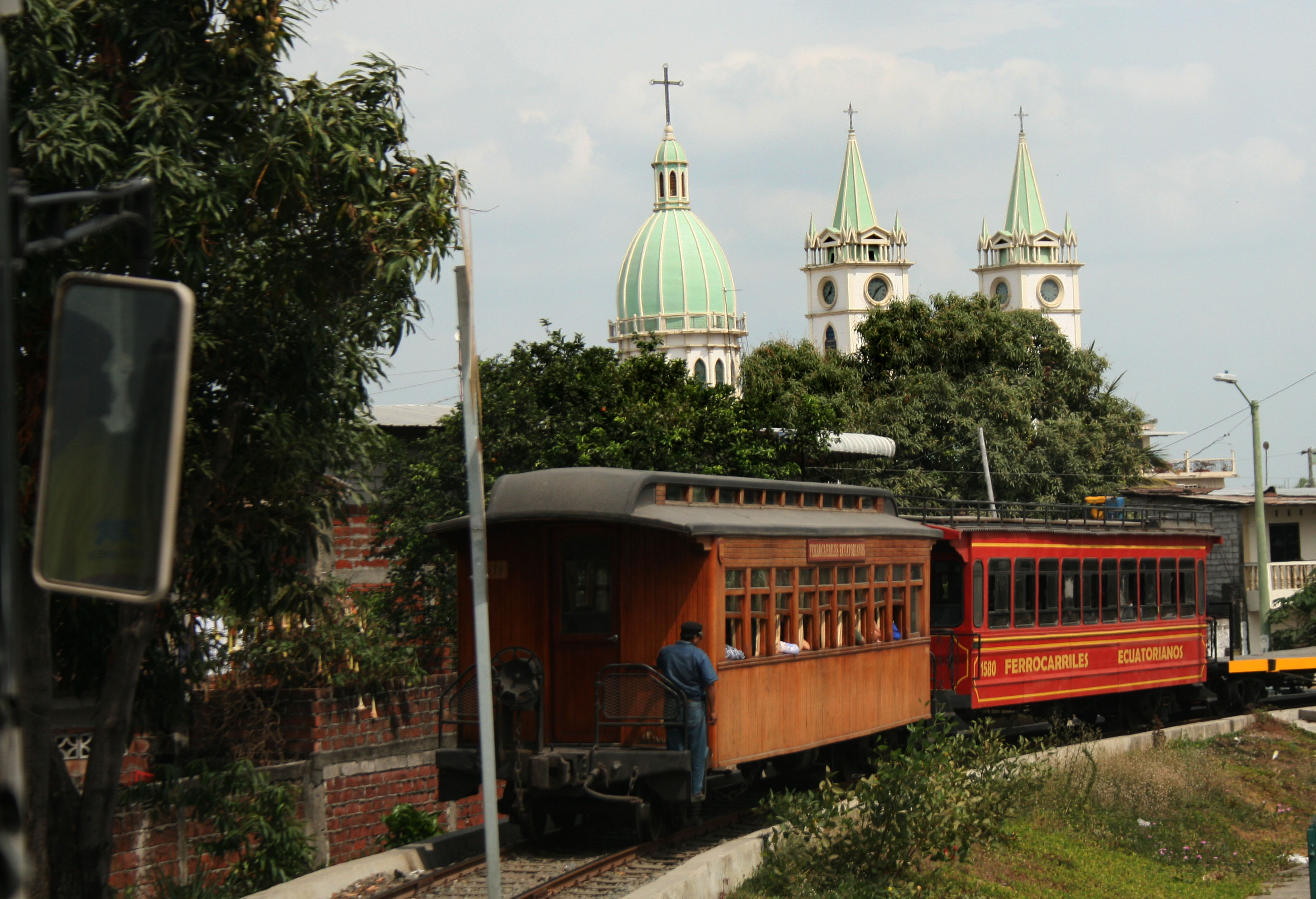 Tren cruzando por Yaguachi. En el fondo, la iglesia. Foto por: María Fernanda Landin.